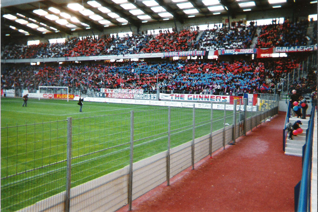 kpo caennais lors du match Caen - Toulouse saison 95/96